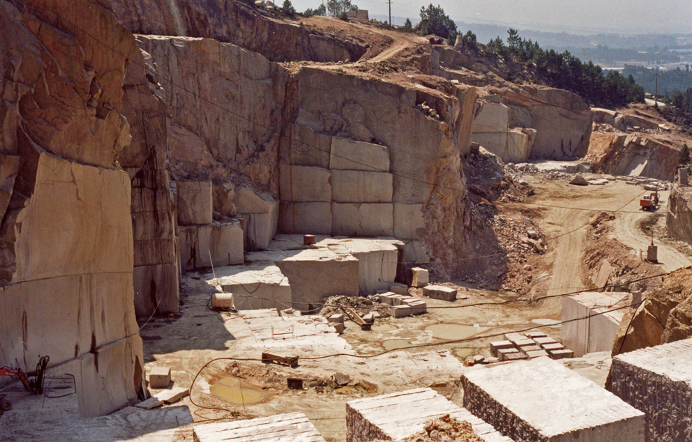 Canteras de granito de Porriño (Pontevedra), explotadas para obtener roca ornamental y de construcción